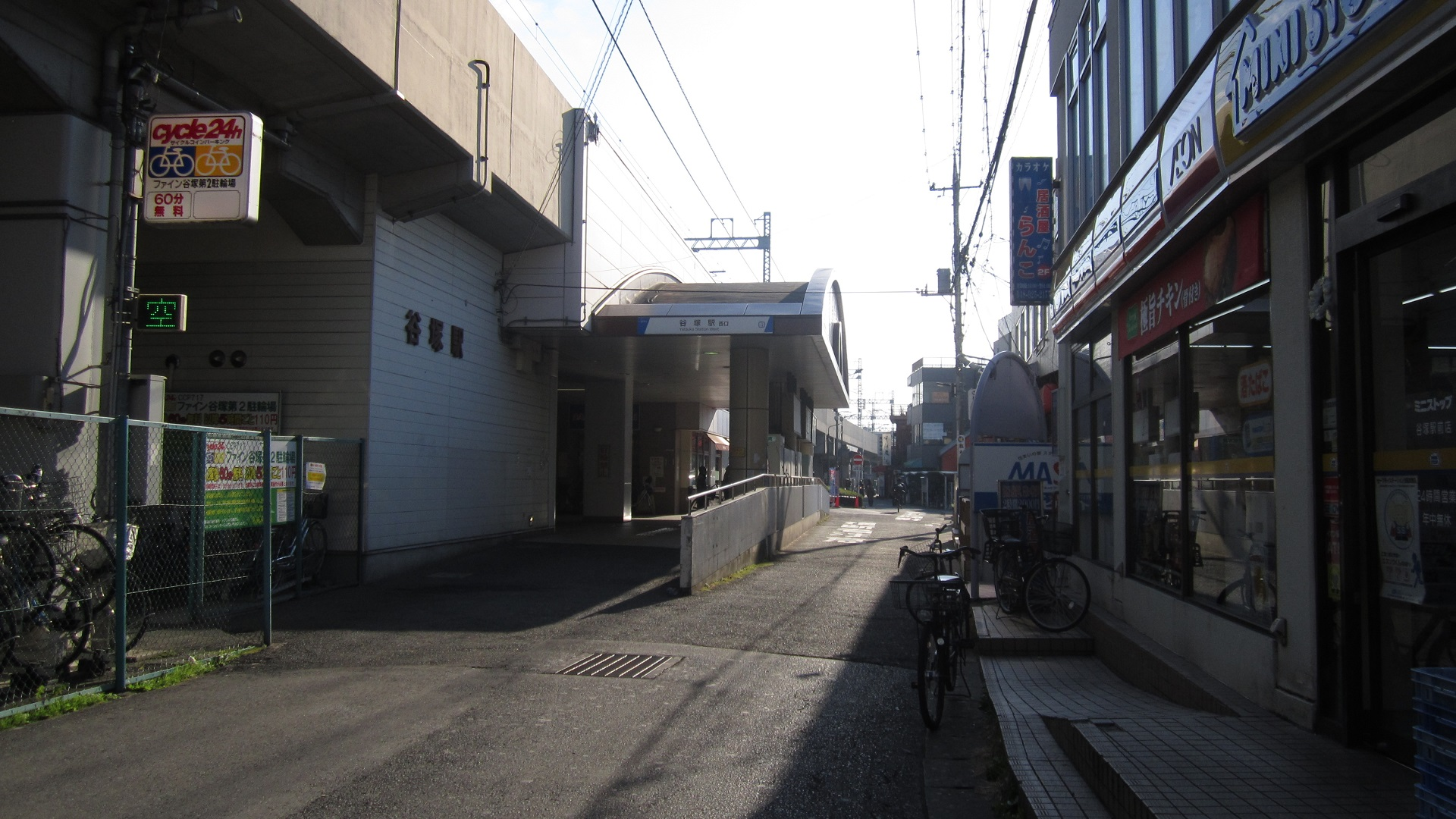 Das ist stations Foto von Japan.